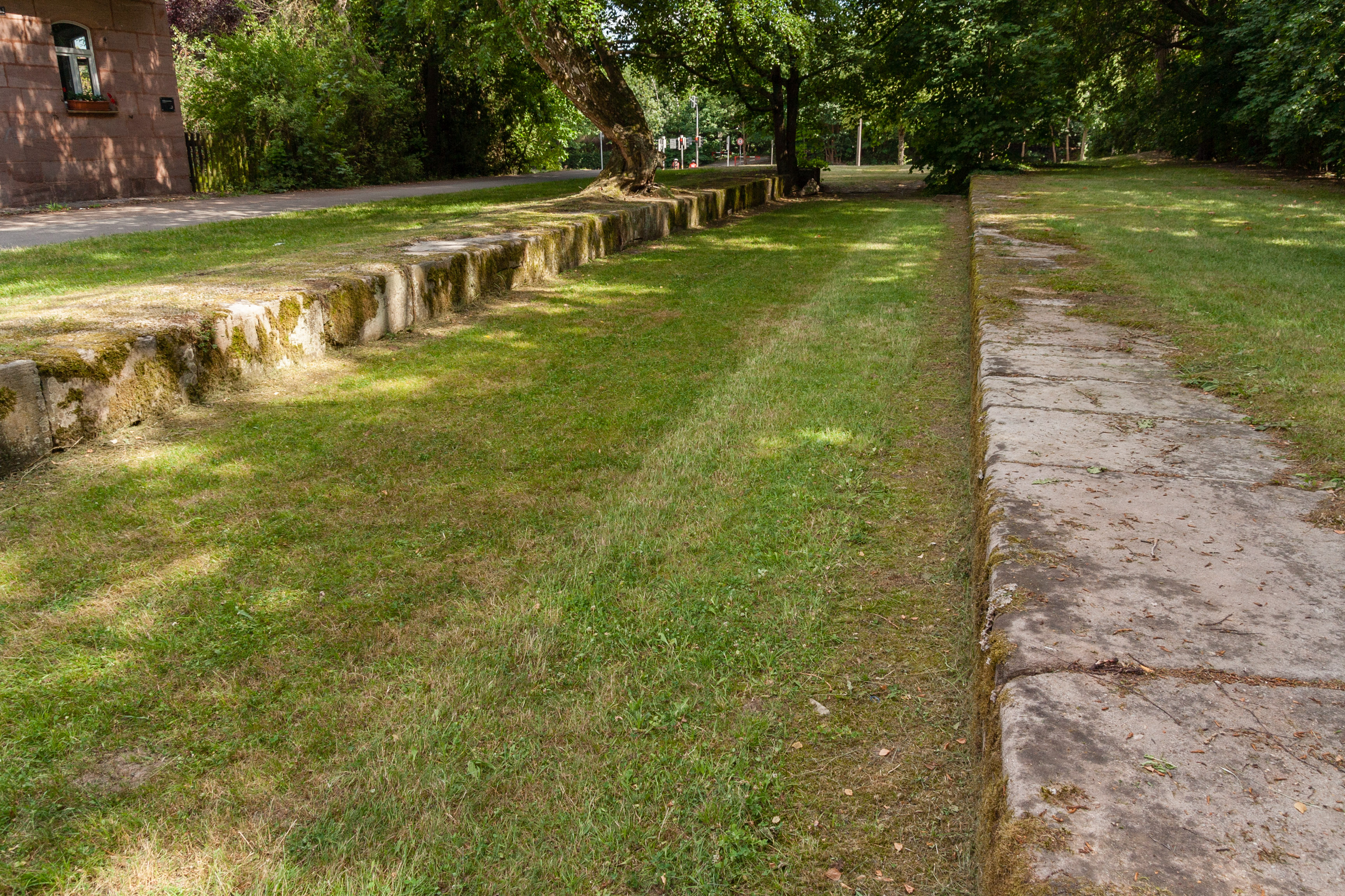 Ludwig-Donau-Main-Kanal, Nürnberg, Schleuse 73